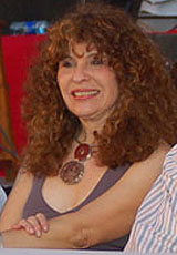 III Festival Internacional de Poesia. Granada, Nicaragua